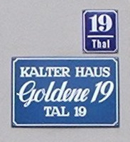 Schild mit Aufschrift „Goldene 19“ zur Erinnerung an des ehemalige Herrenbekleidungsgeschäft am Kalter-Haus, Tal 19, München.